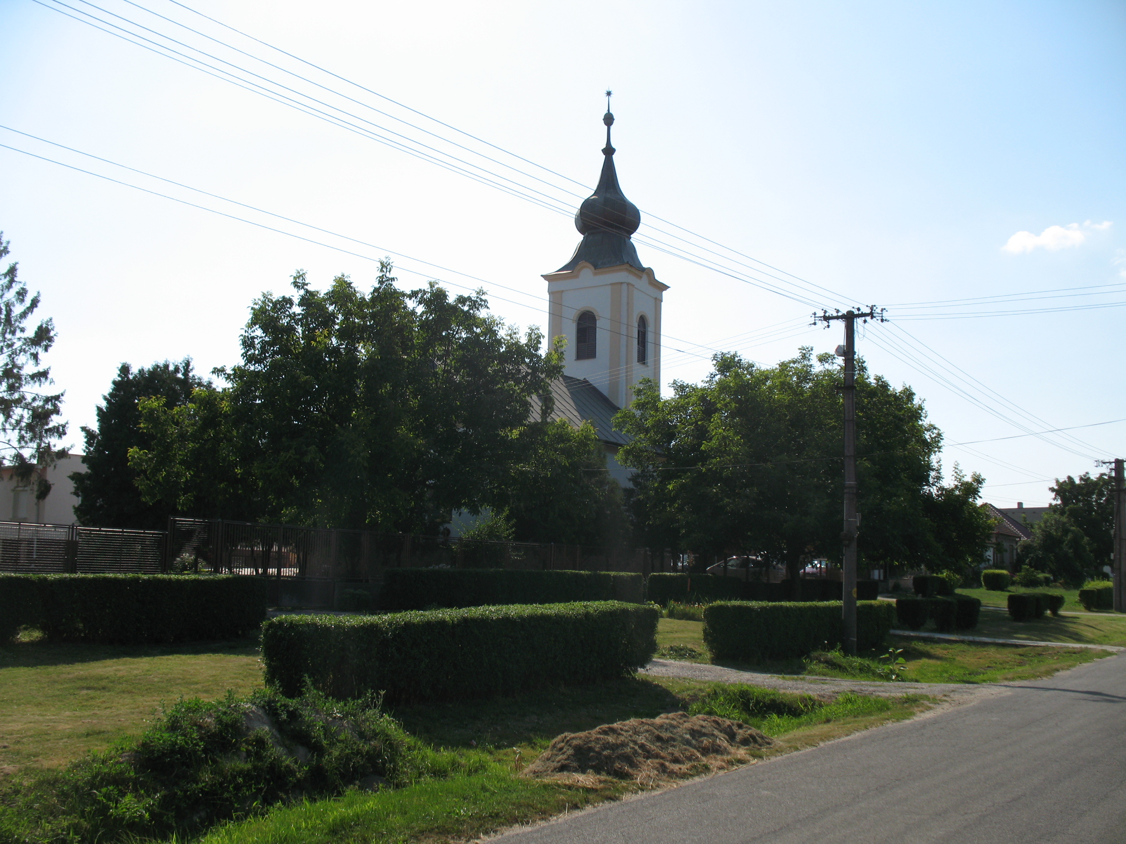 Bátorkeszi